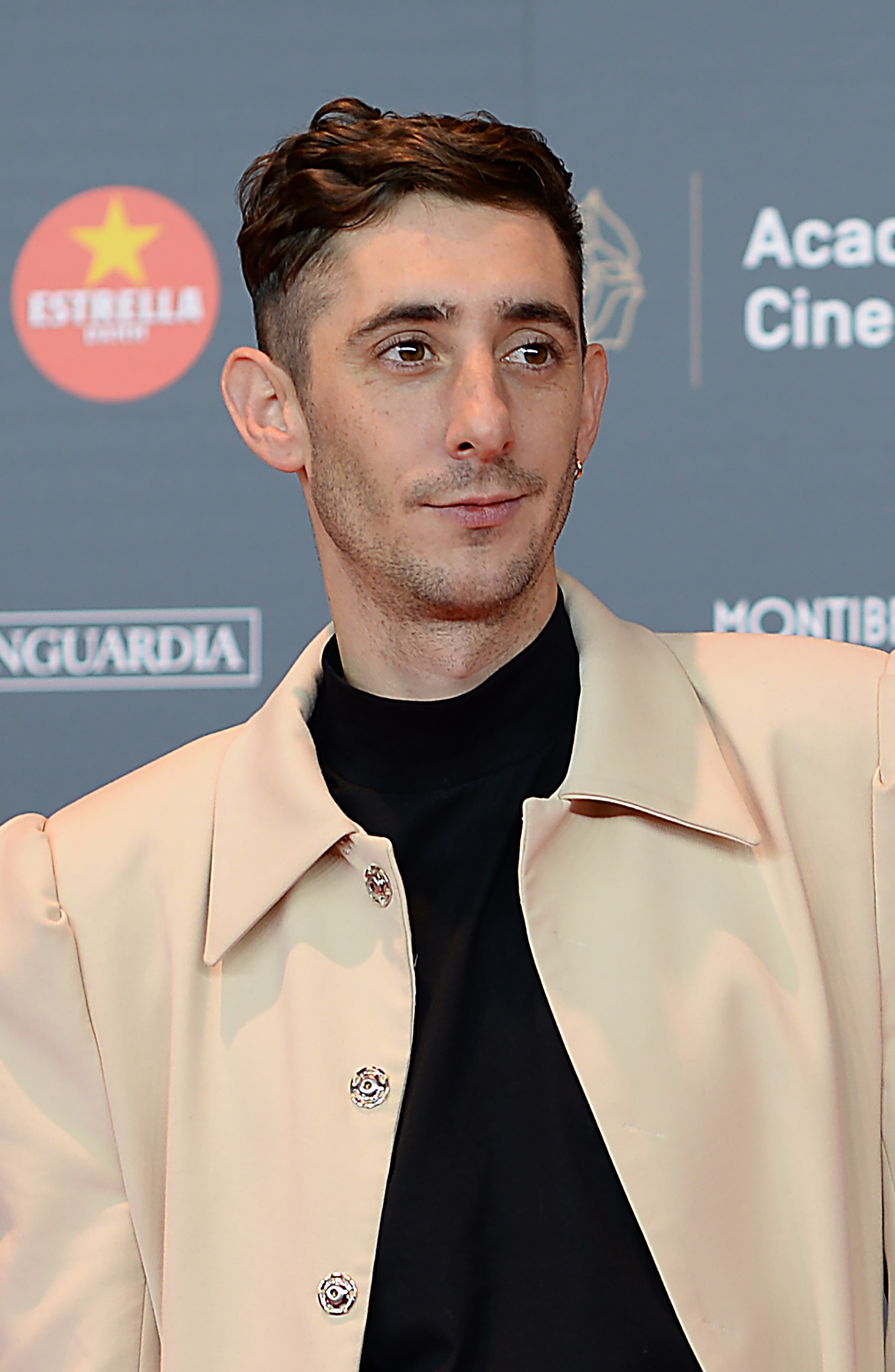 Enric Auquer, actor, XII Premis Gaudí (2020)